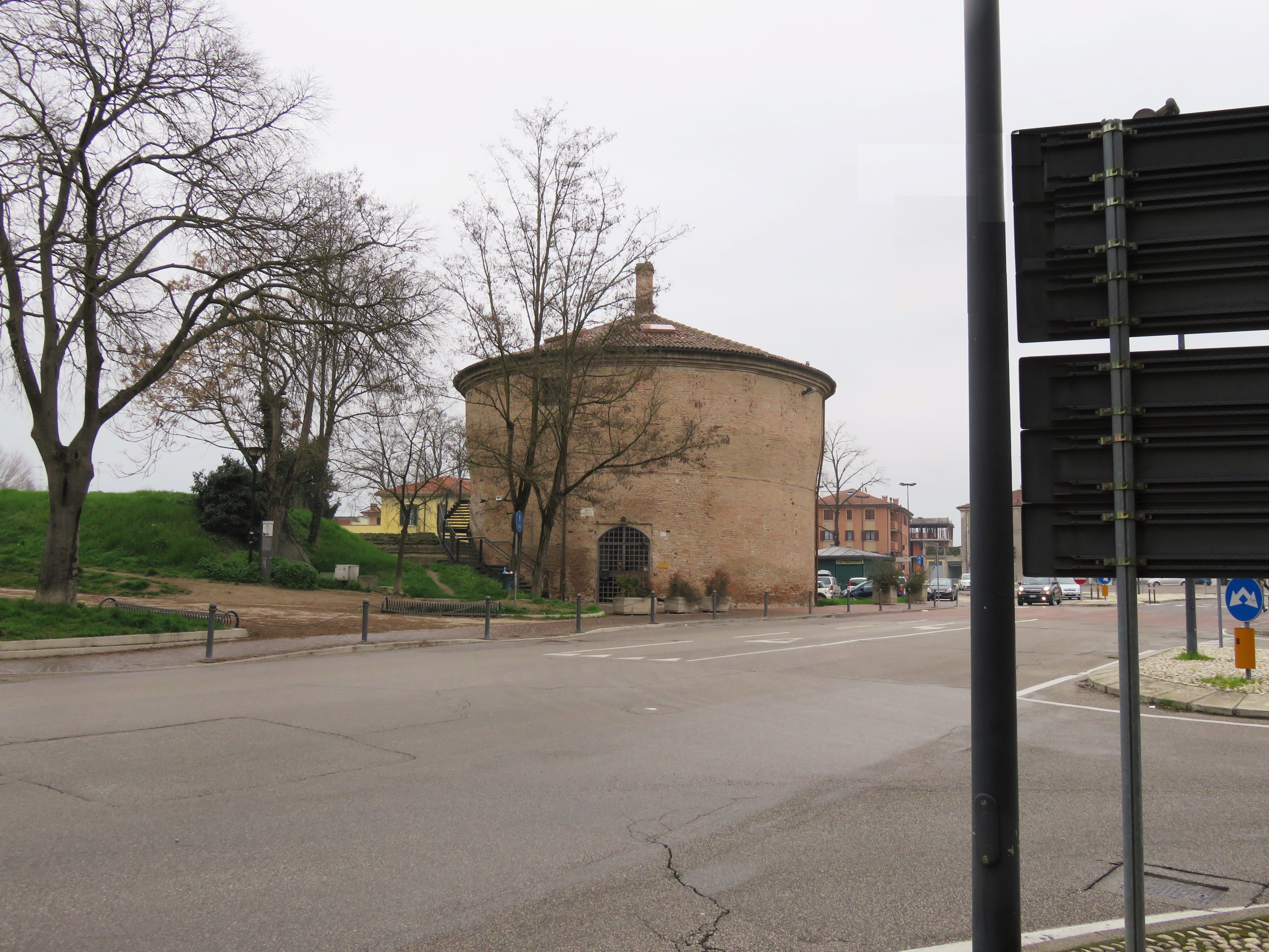 Torrione di San Giovanni, Ferrara. Sede del Jazz Club Ferrara